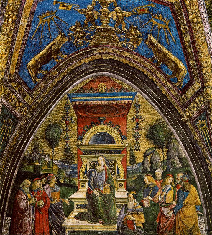 The Arithmetic 1492-94 Fresco Palazzi Pontifici, Vatican Borgia Apartment